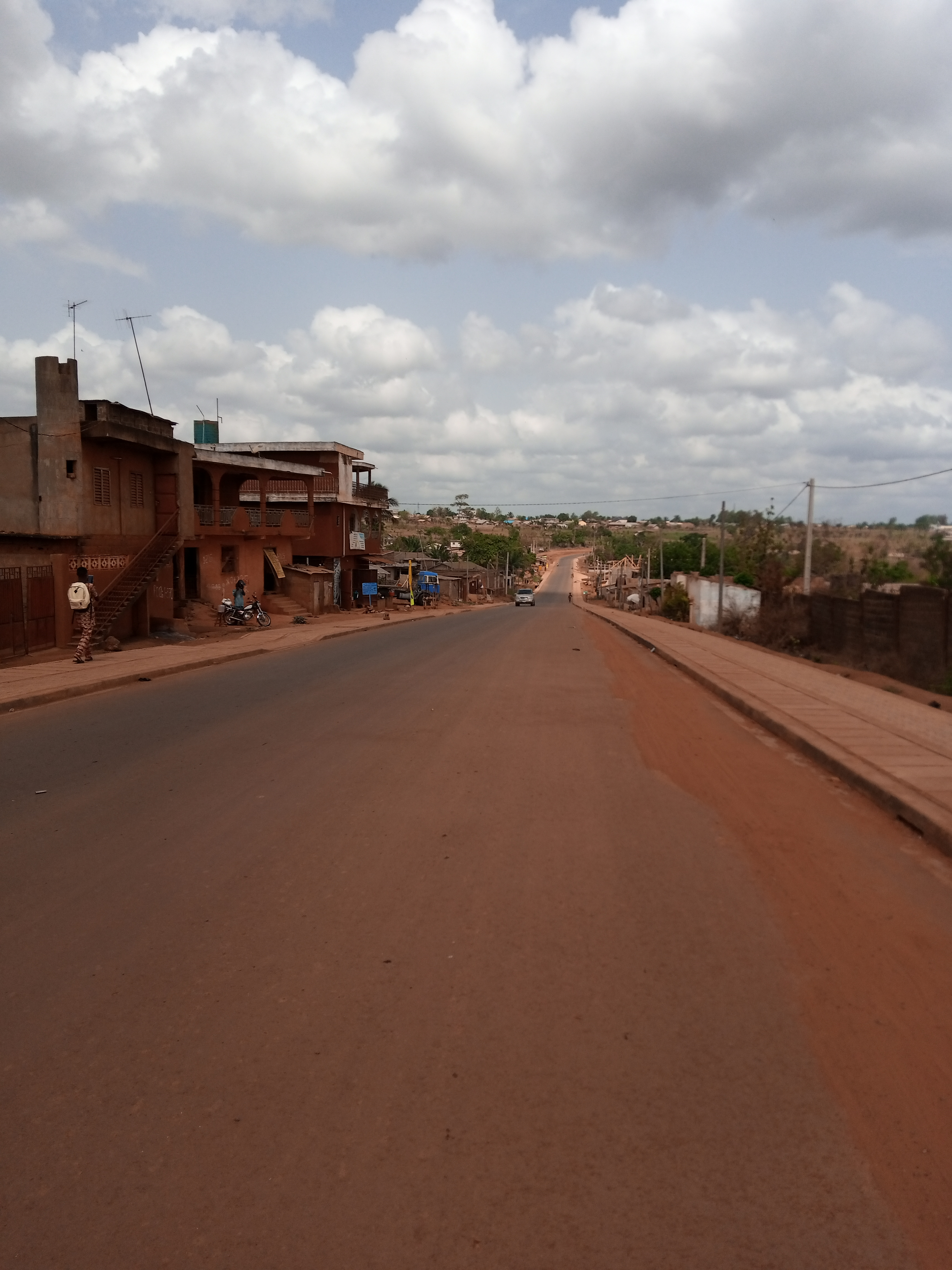 voie Pobé onigbolo This is an image with the theme "Africa on the Move or Transport" from: Benin